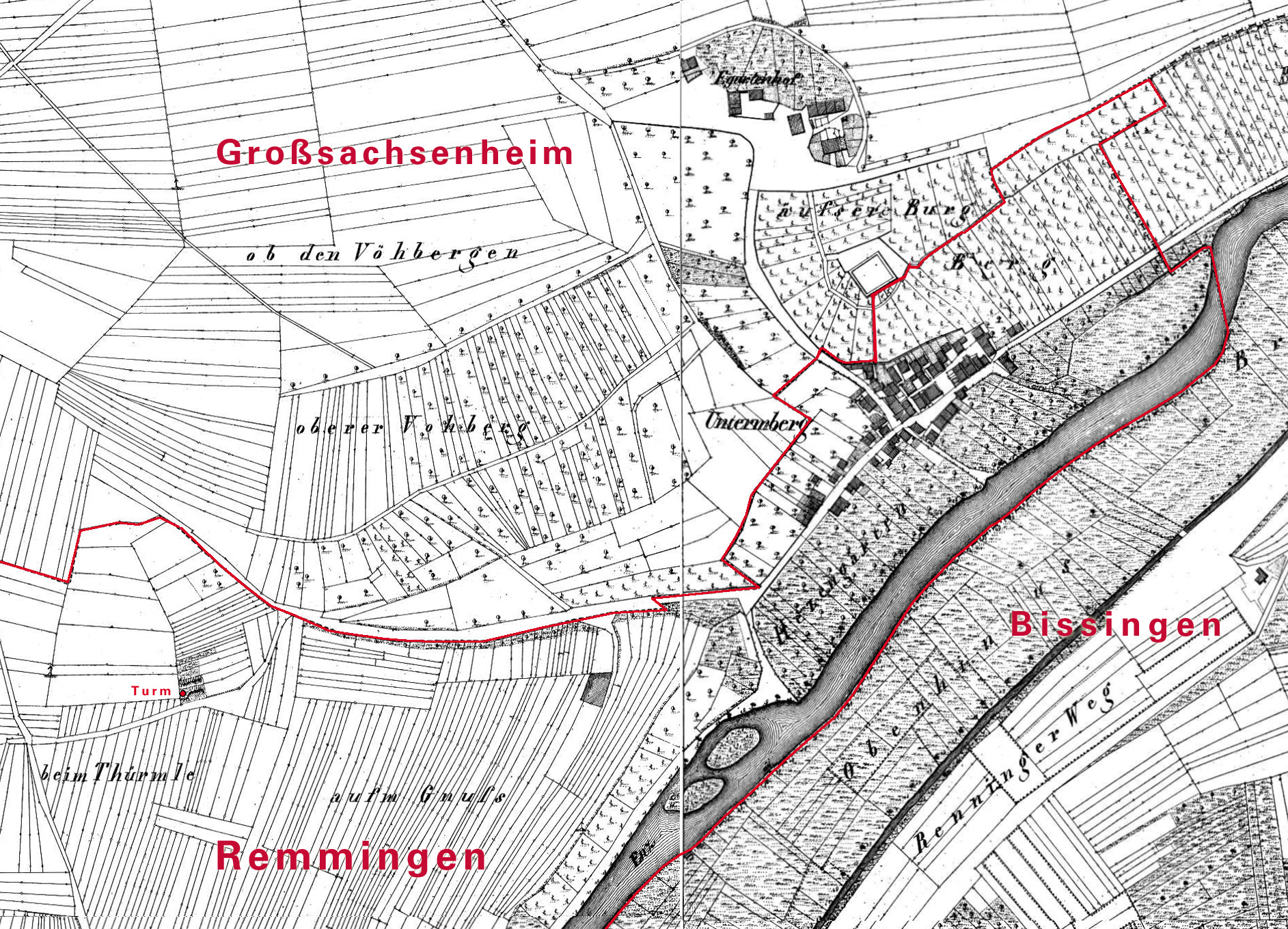 Markungsgrenze von Remmingen, Äußere Burg (Altsachsenheim) und Türmle auf der württ. Urflurkarte von 1832. Komposit von NO XLI, Blätter 2+3, NO XLII, Blätter 2+3